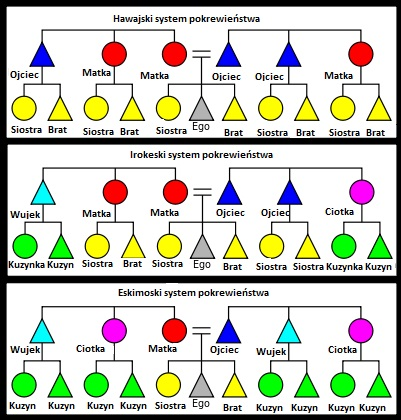 Porównanie 3 systemów pokrewieństwa